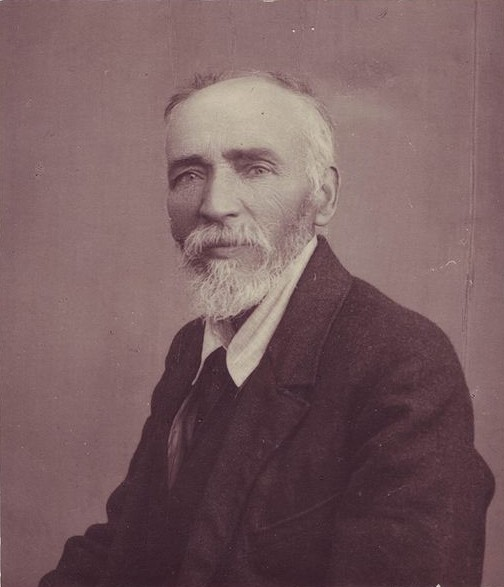 ak.sochař Bohumil Vlček (1862-1928)